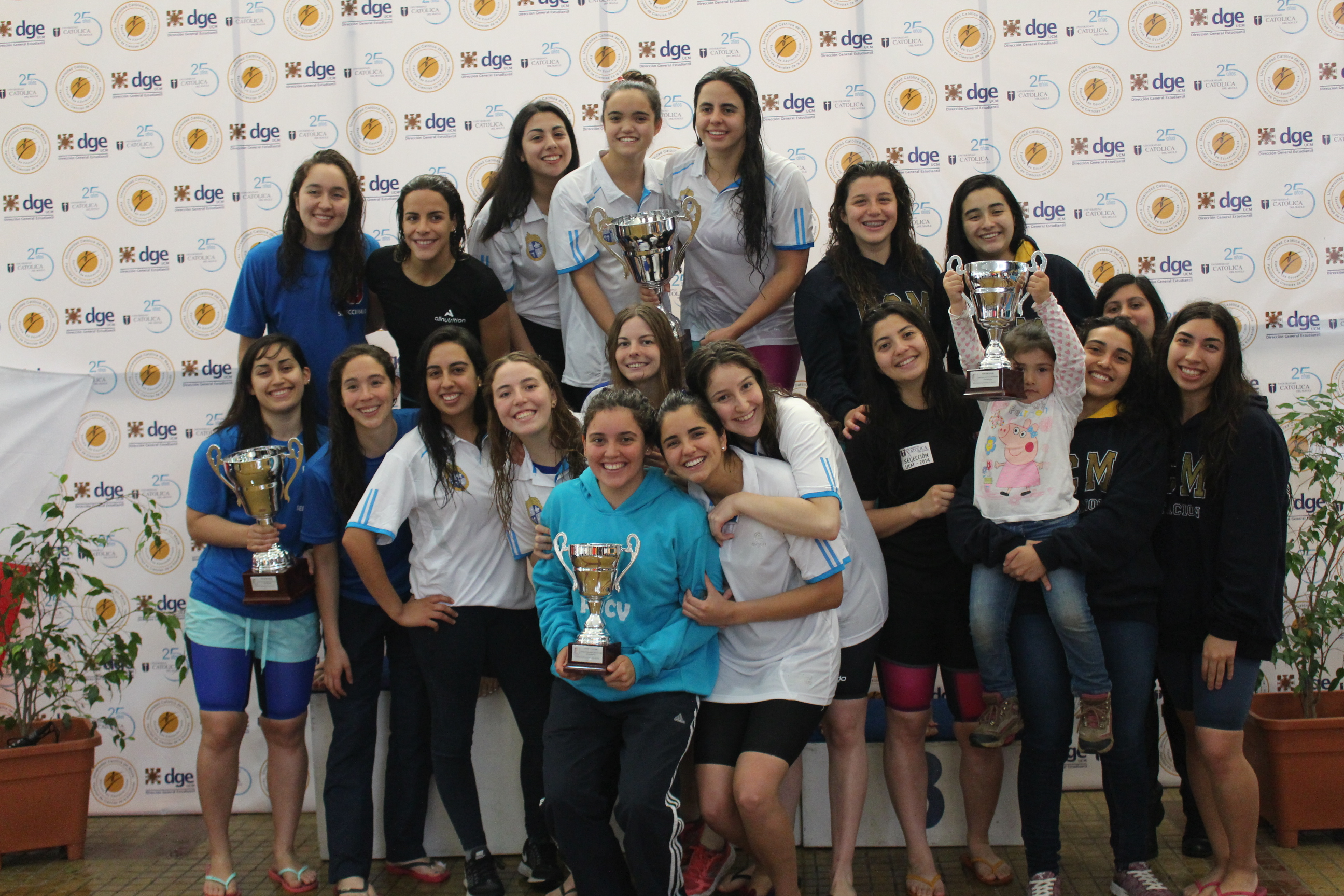 Finales Nacional Natación Fenaude 2016 Universidad Católica del Maule , Talca